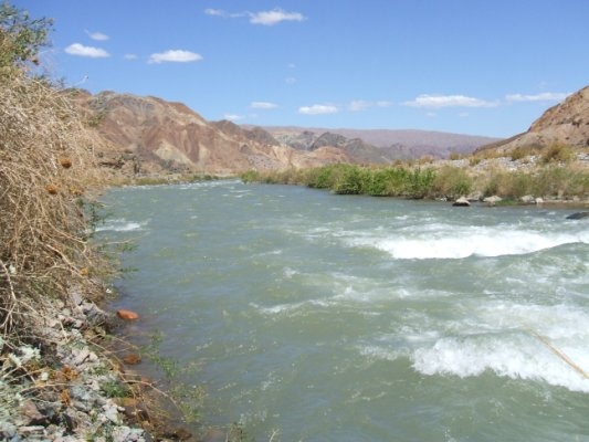 Río Castaño, cerca de Villa Corral, departamento Calingasta, provincia de San Juan, Argentina.